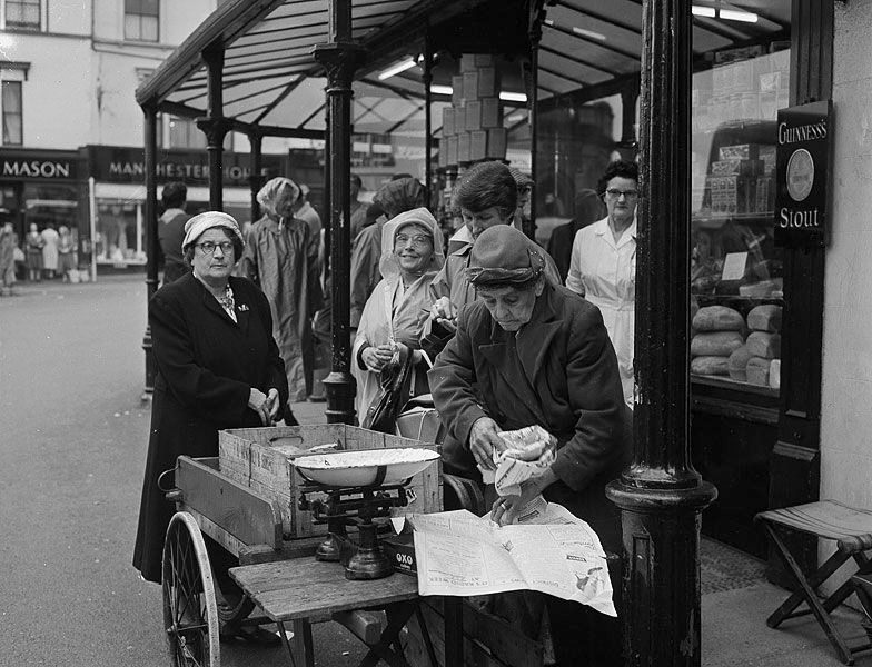 Teitl Cymraeg/Welsh title:Conwy Honey Fair. Ffotograffydd/Photographer: Geoff Charles (1909-2002) Dyddiad/Date: September 15, 1960. Cyfrwng/Medium: Negydd ffilm / Film negative Cyfeiriad/Reference: (gch22415) Rhif cofnod / Record no.: 3470699 Rhagor o wybodaeth am gasgliad Geoff Charles yn Llyfrgell Genedlaethol Cymru More information about the Geoff Charles Collection at the National Library of Wales Mae ffotograffau Geoff Charles hefyd yn rhan o Broject Europeana Libraries Geoff Charles' photographs also form part of the Europeana Libraries Project